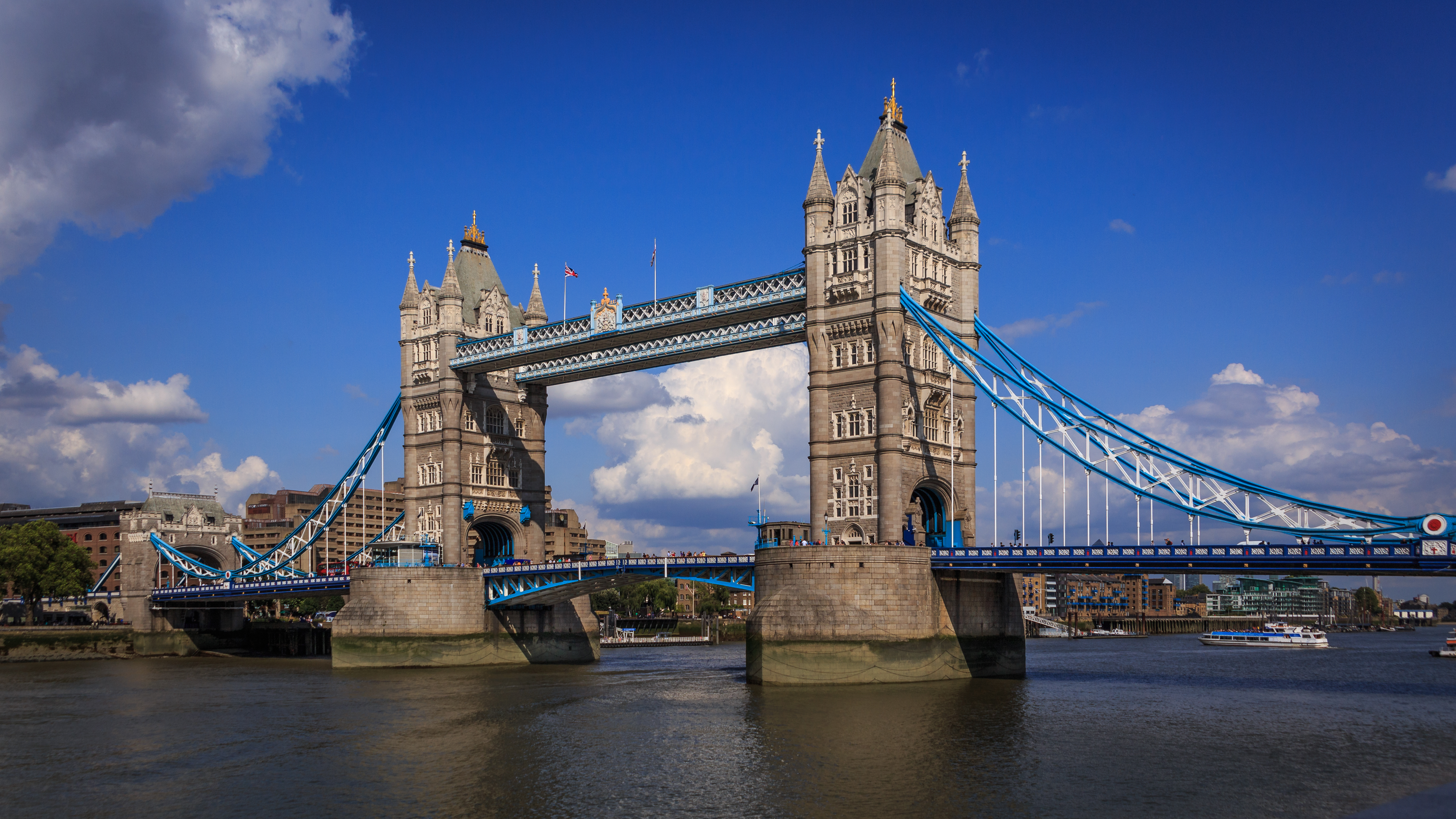 Tower Bridge, Londres.